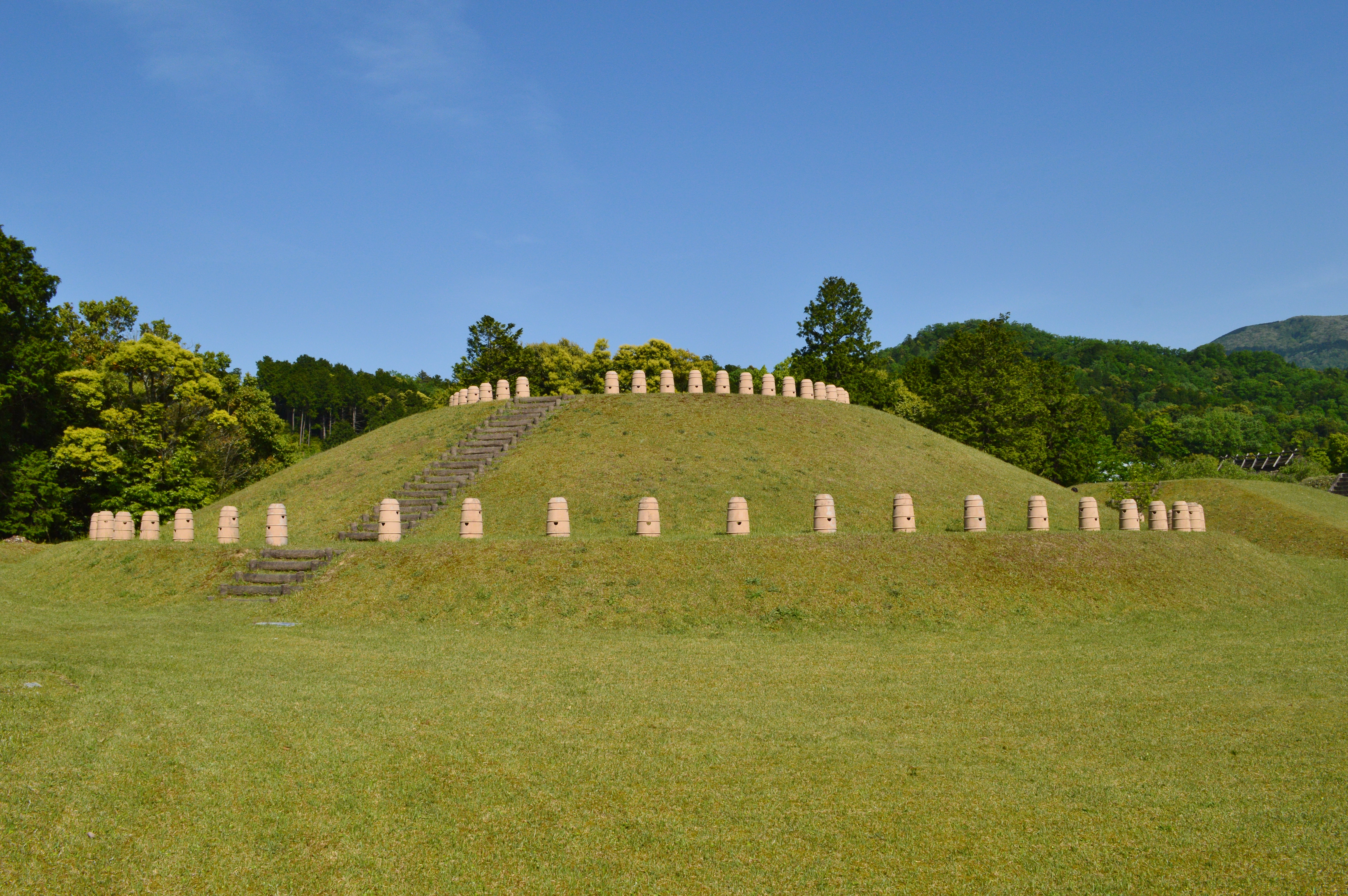 作山2号墳 墳丘全景